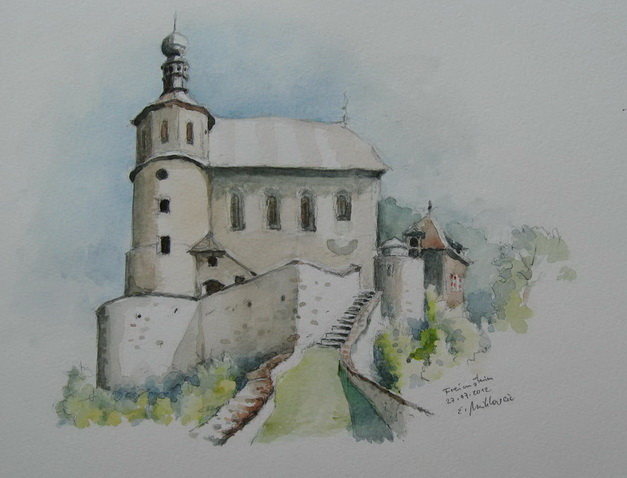 Kath. Filialkirche, Wallfahrtskirche Maria Sieben Schmerzen m. Befestigungs- u. Toranlage m. Brücke sowie Hl. Grab-Kapelle